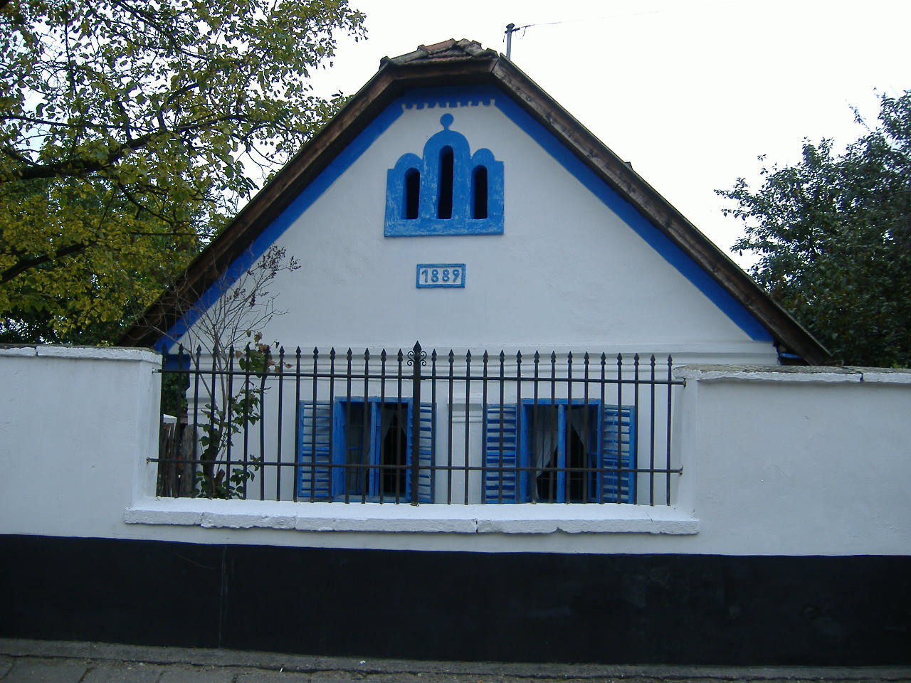 Noszvaj, gazdaház (Heves megye)